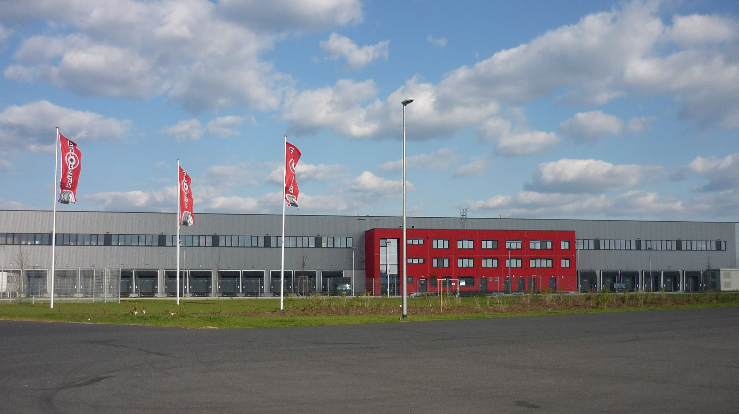 Lager von in Hildesheim, Deutschland